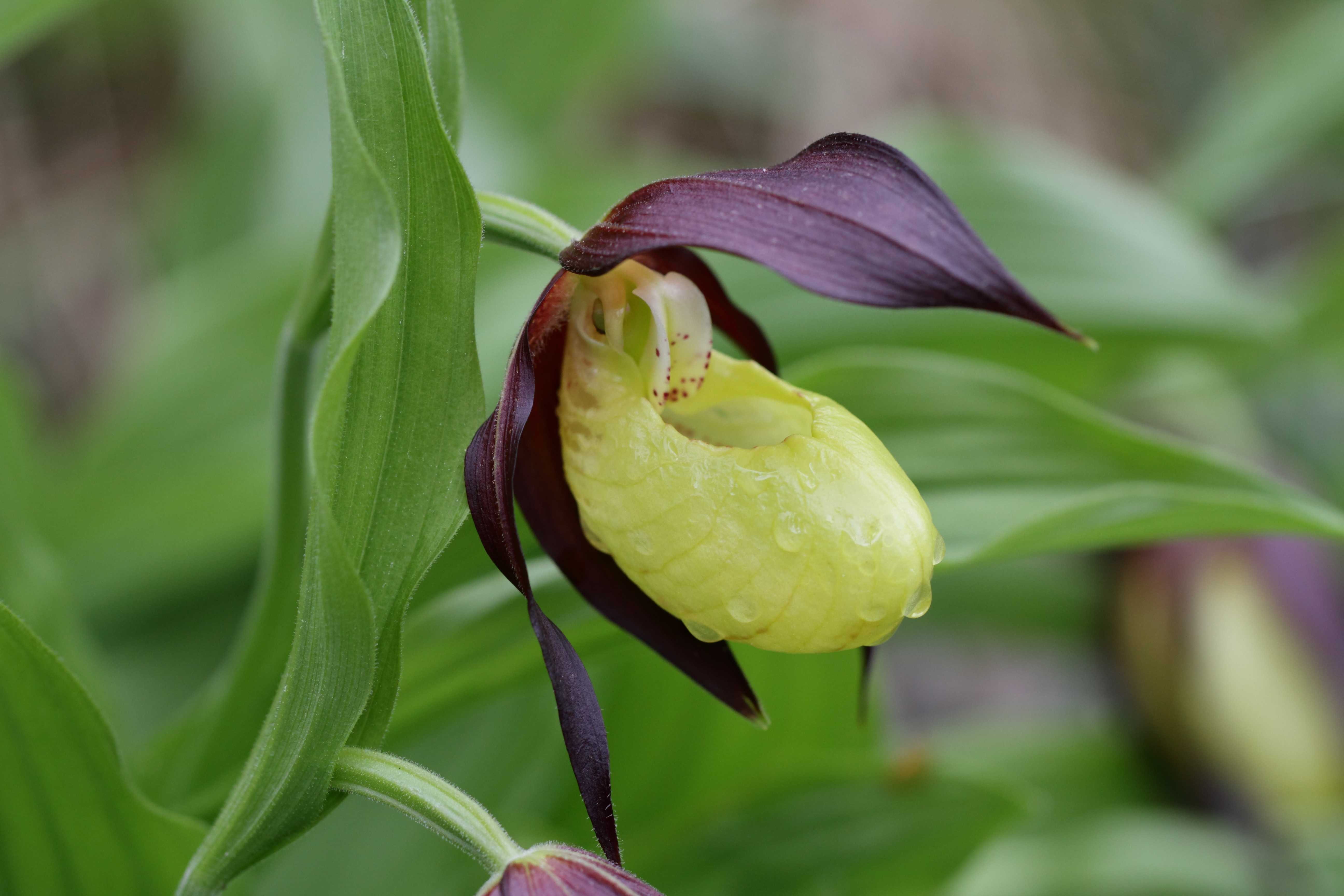 Ein Gelber Frauenschuh in der Steiermark.